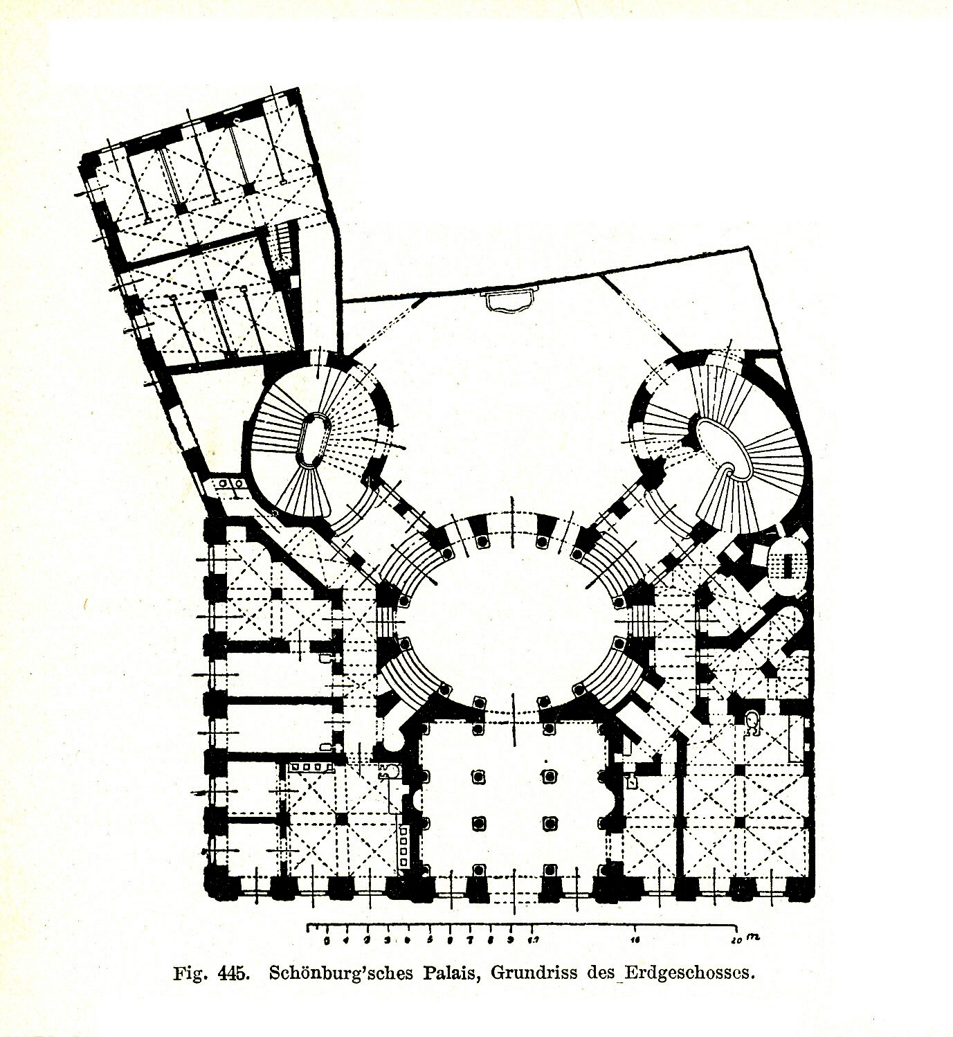 Palais Vitzthum-Schönburg, Moritzstraße Dresden, vor dem Abbruch 1885, Grundriss